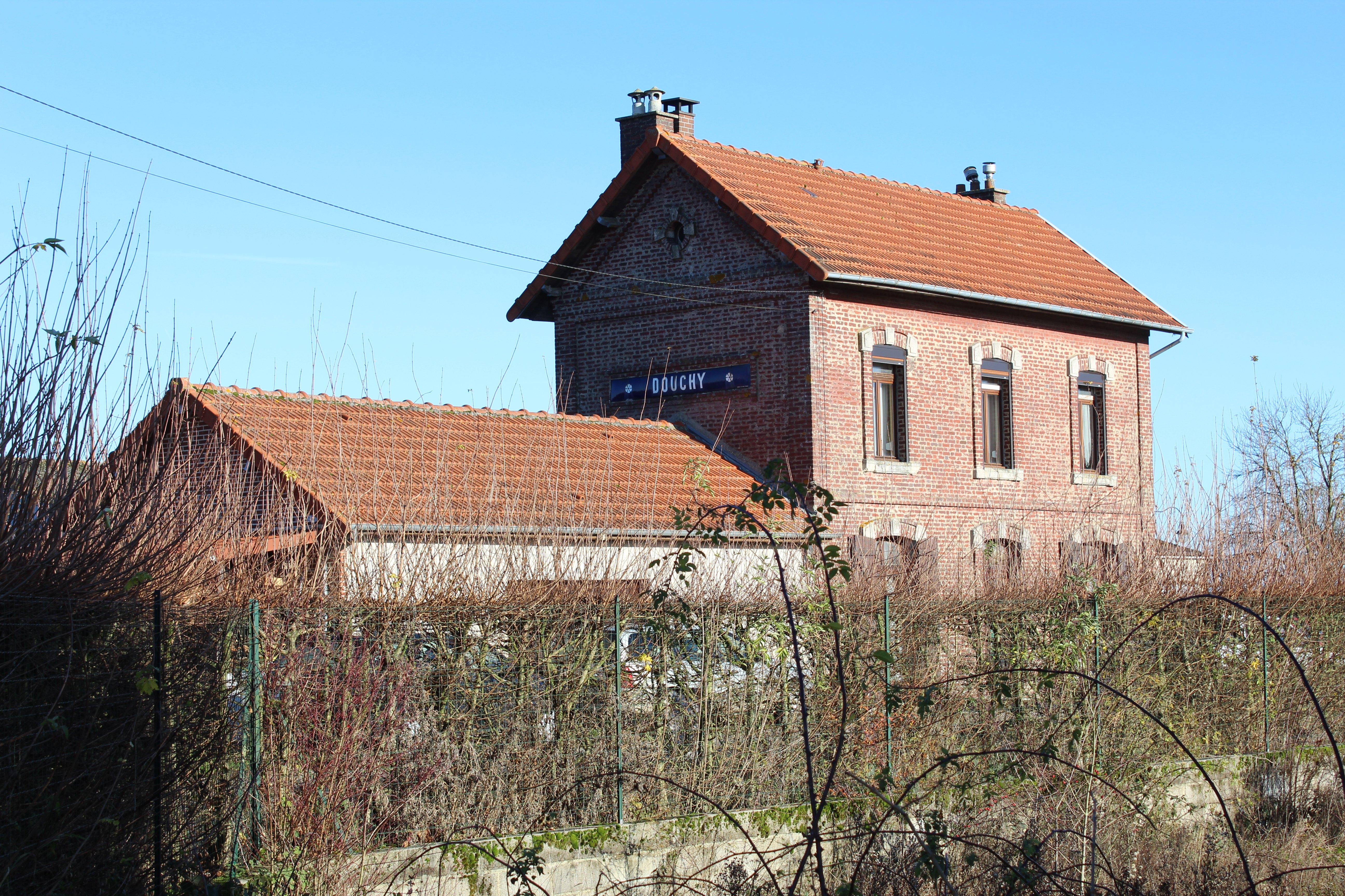 L'ancienne gare de Douchy.